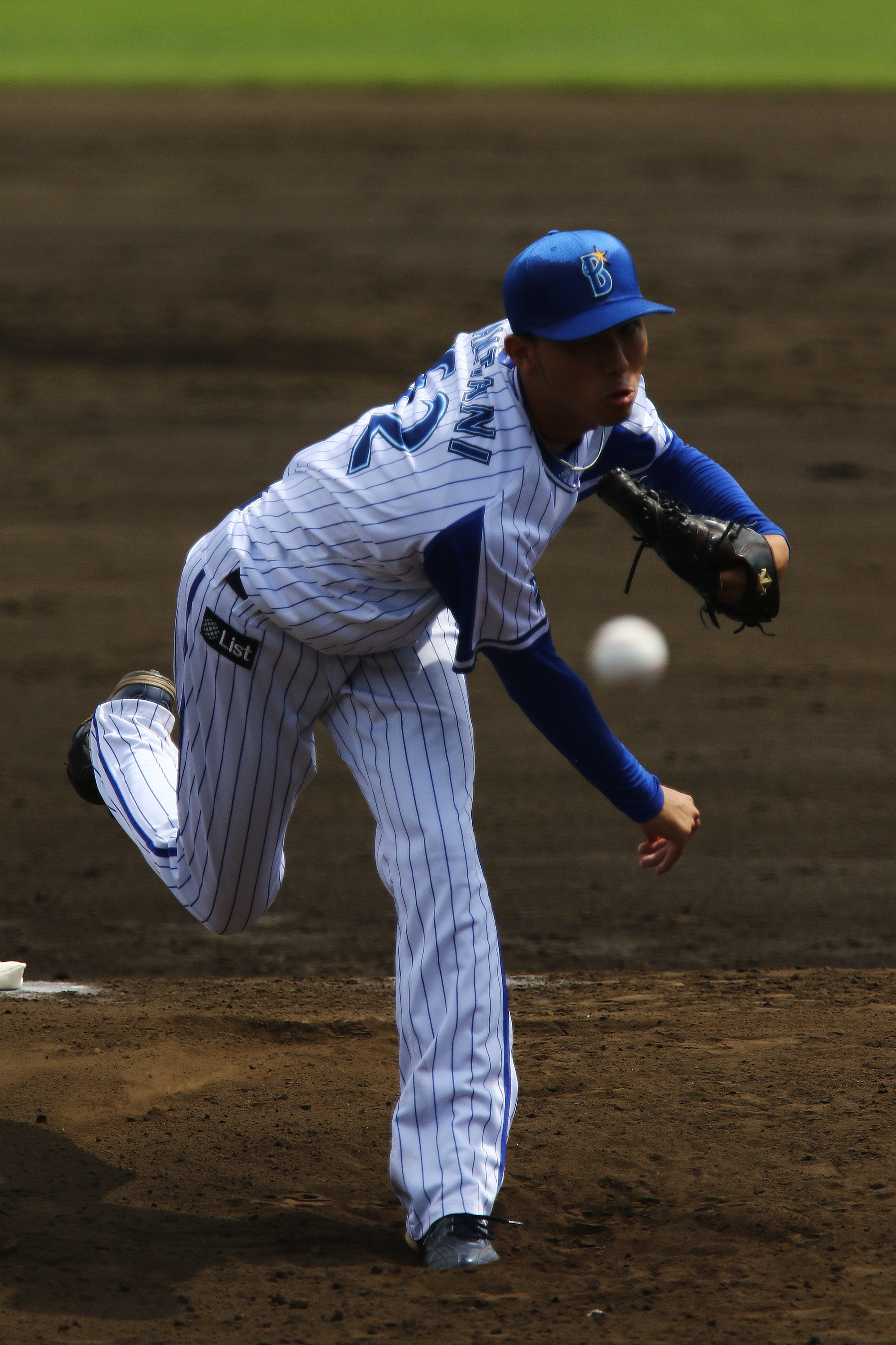 横浜DeNAベイスターズの萬谷康平